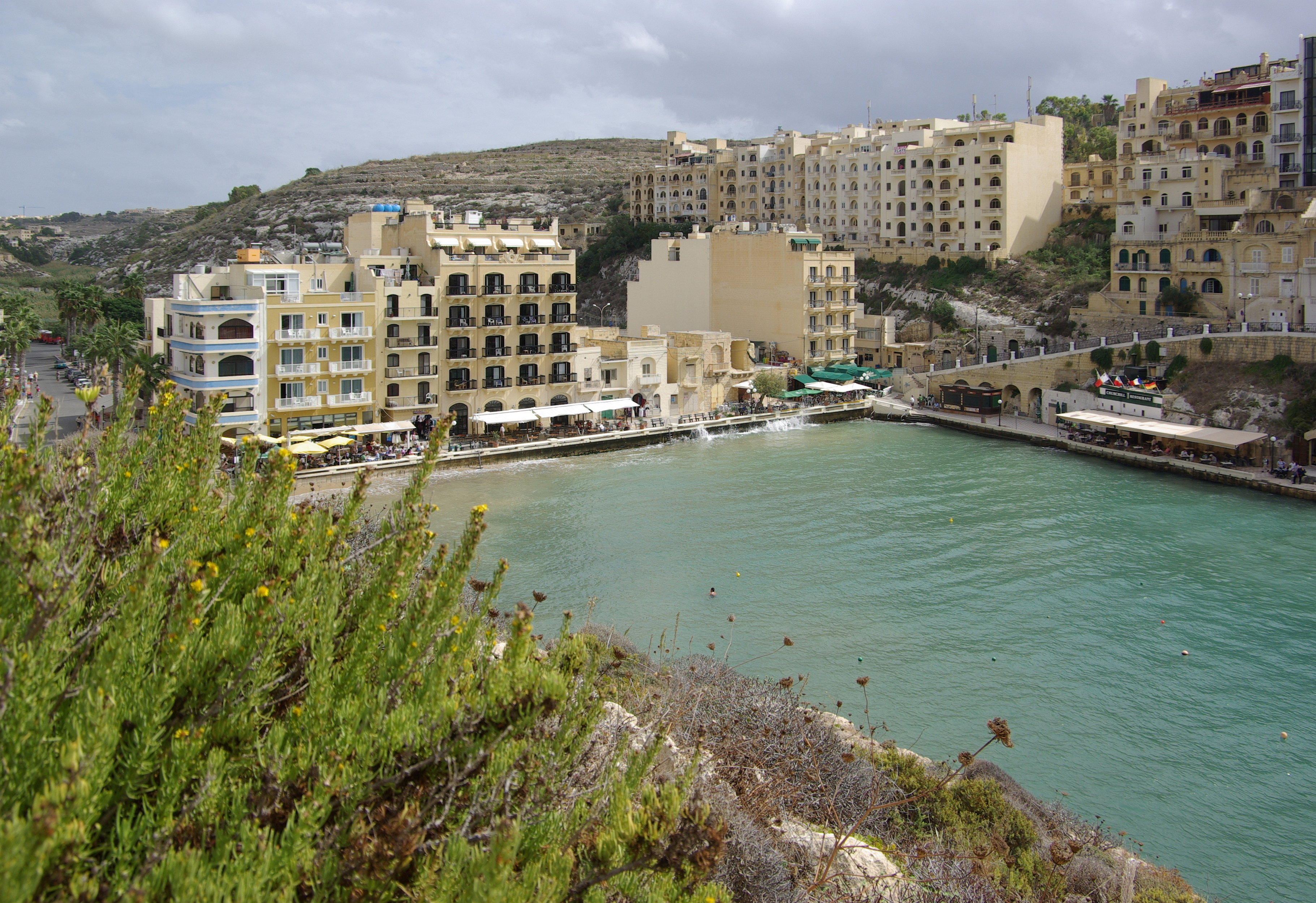 Malta, Gozo, Xlendi